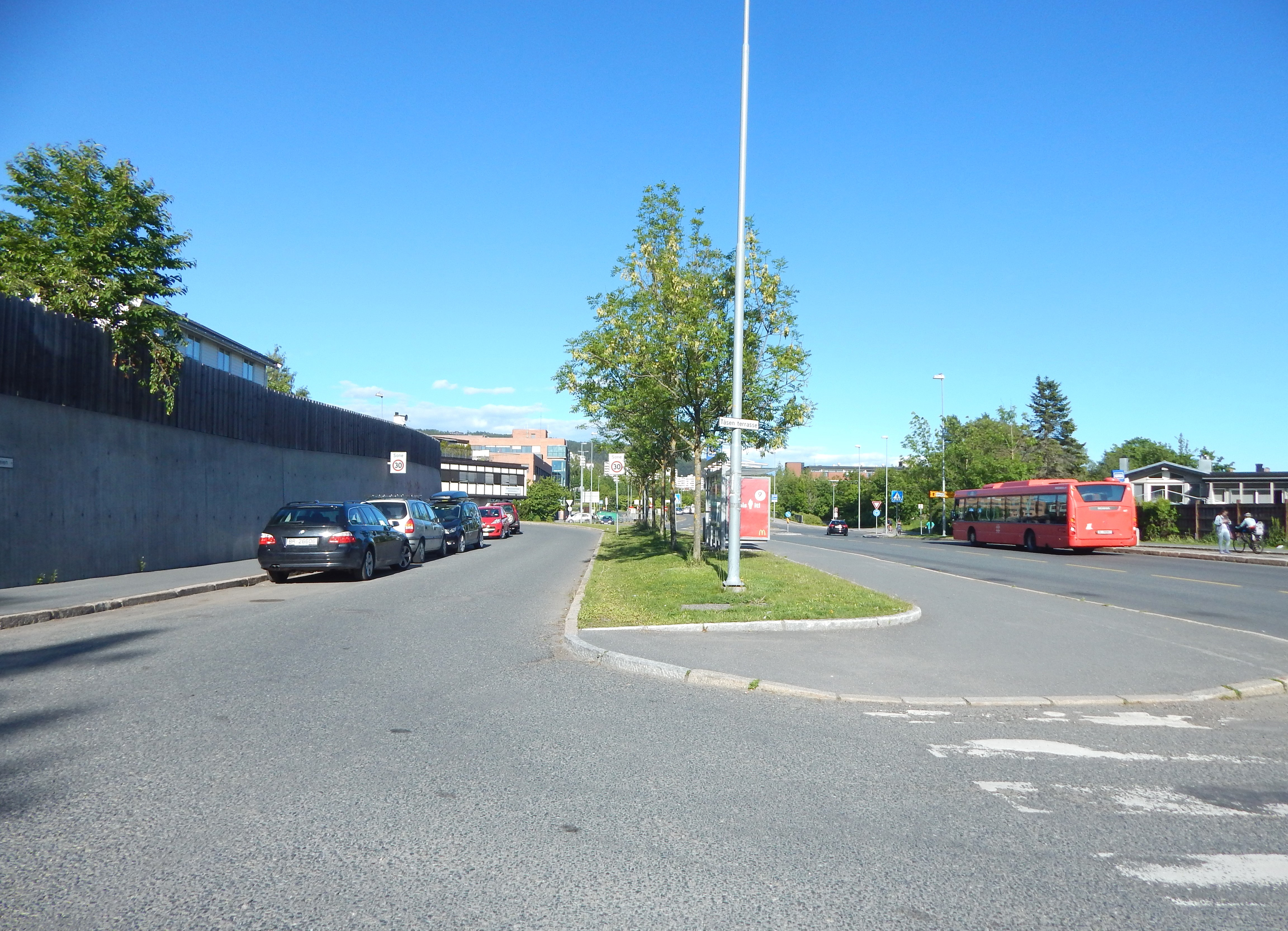 Tåsen terrasse munner ut i Rolf Wickstrøms vei, og Bergrådveien fortsetter til venstre.